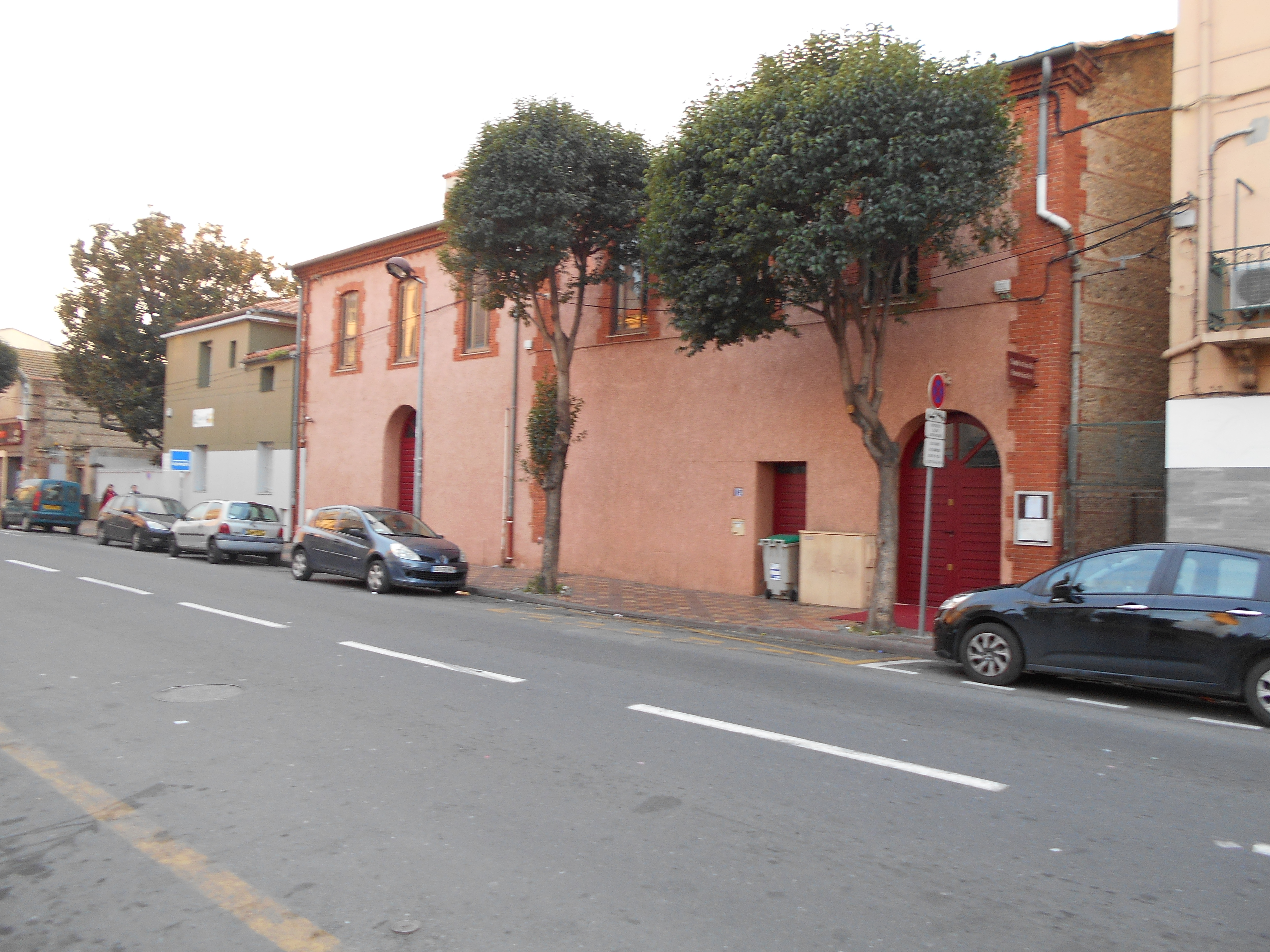 Façana de llevant de Crist Rei, des del nord